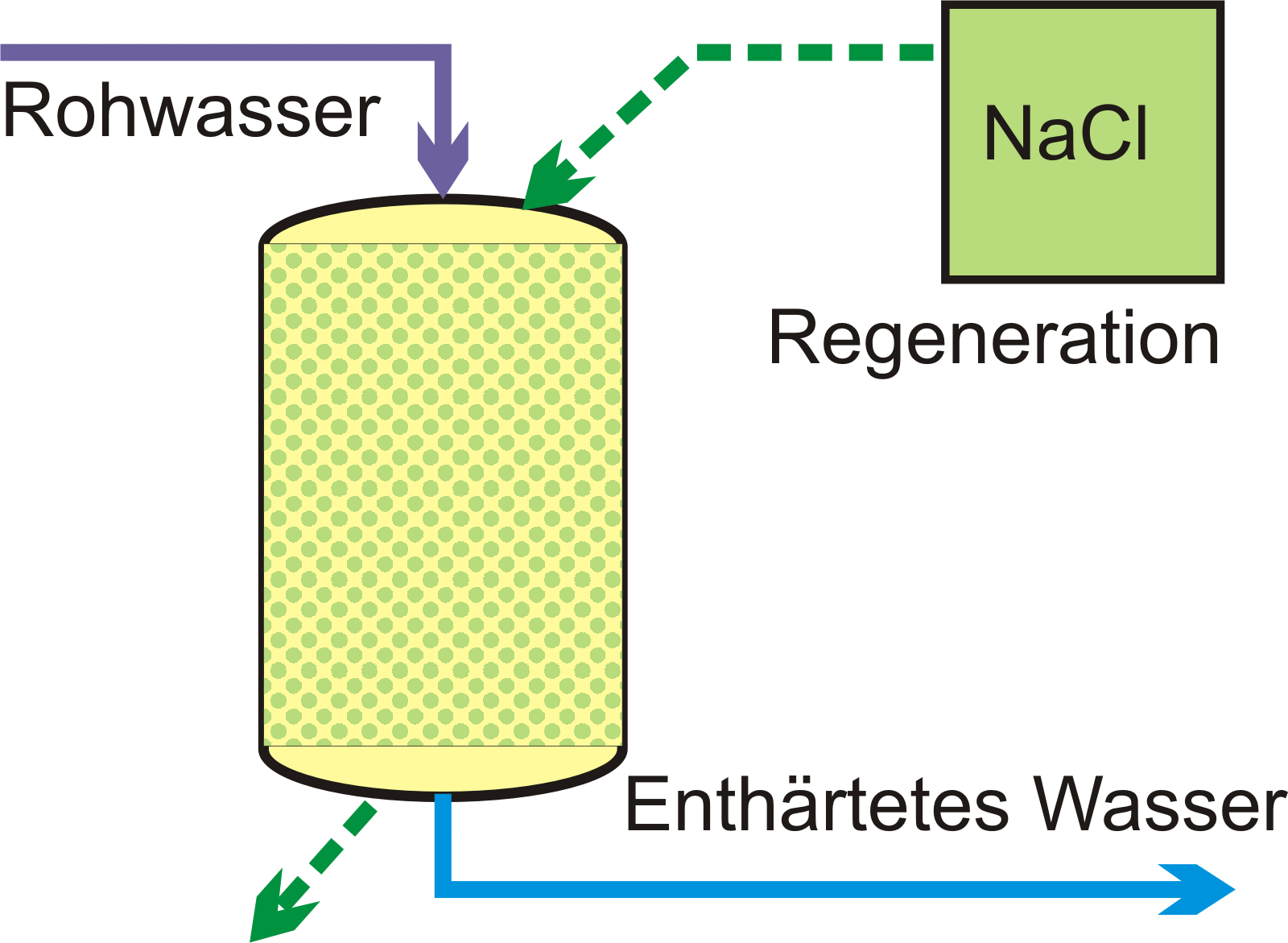 Enthärtung mittels Basenaustauscher